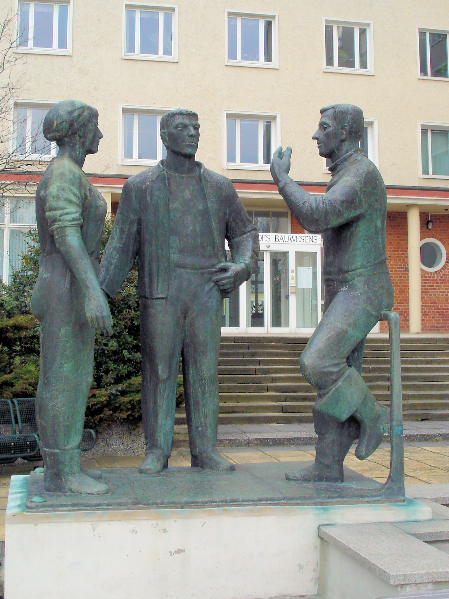 Bronzefigurengruppe "Fischer im Gespräch" von Wolfgang Eckardt in Rostock 1965